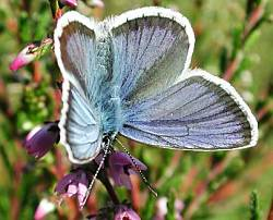 Plebejus argus - Heideblauwtje Foto gemaakt op Laapersveld, Hilversum op nl:14 juli nl:2002. (eigen opname) Categorie:Afbeelding dier